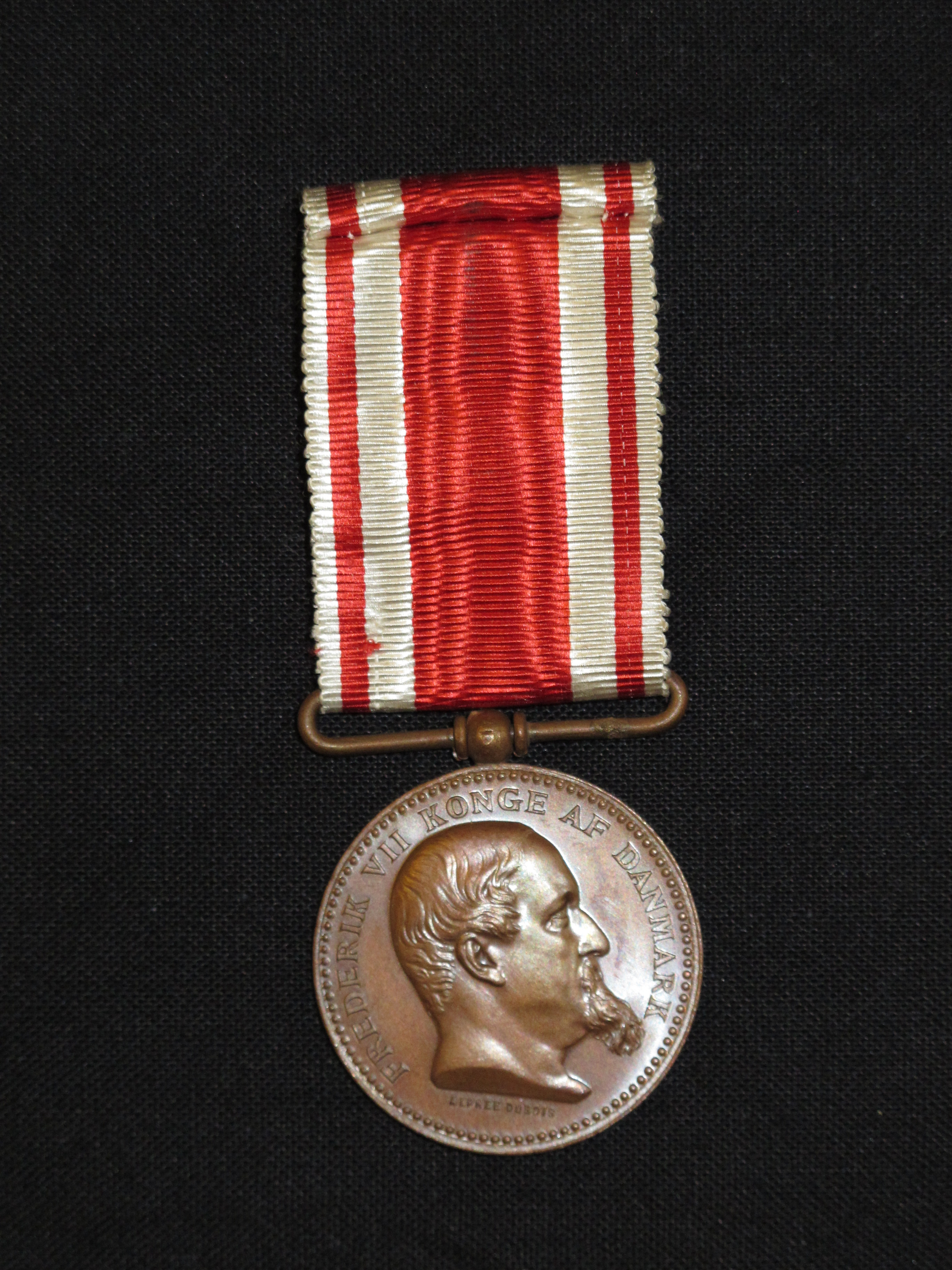 Erindringsmedalje for krigsdeltaglse i Krigen 1848-50 også kendt som Treårskrigen.